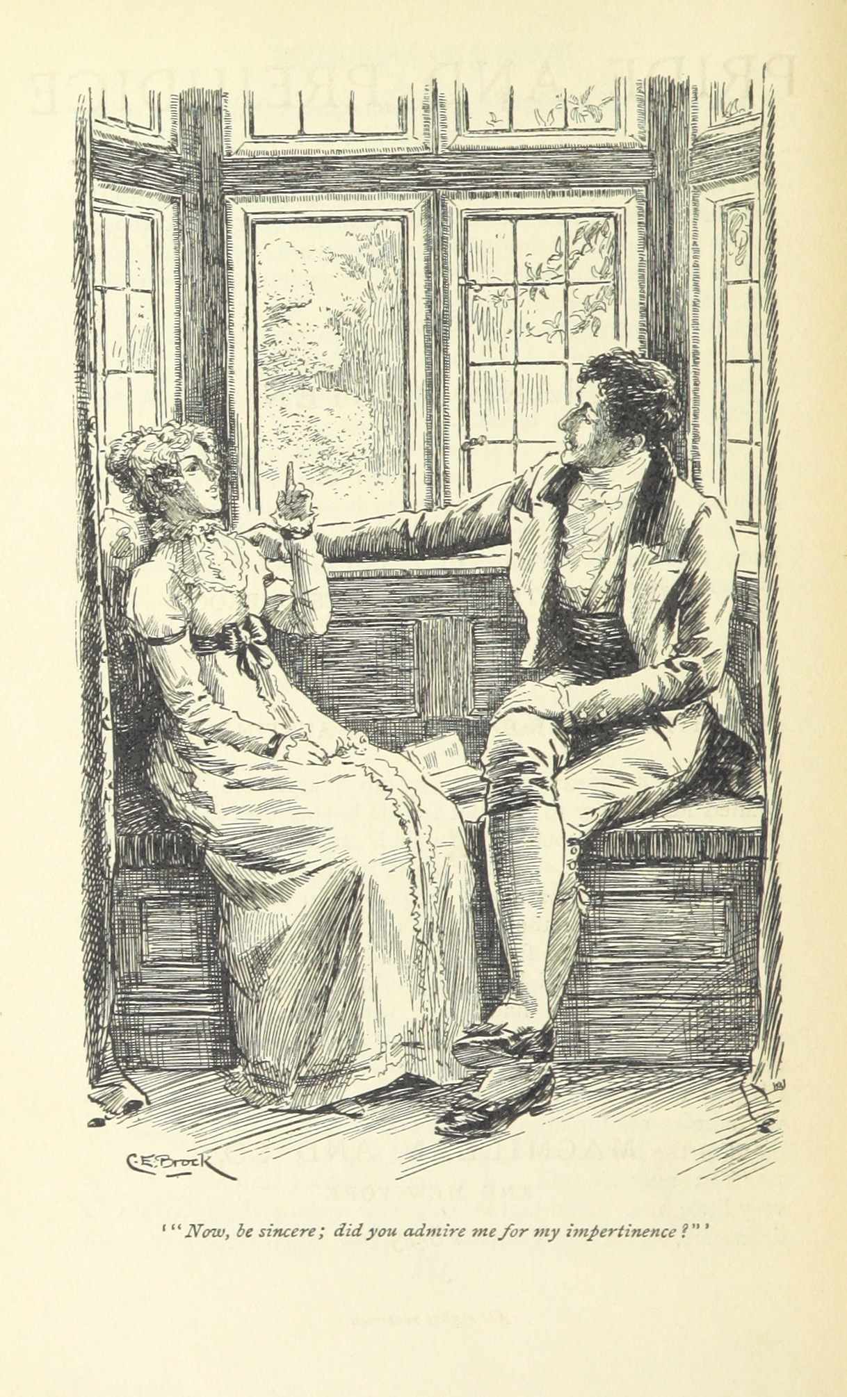 Illustration de C. E. Brock pour Pride and Prejudice (Edition MacMillan & C°, ch. 60)